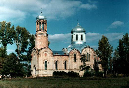 Свято-Троицкий храм